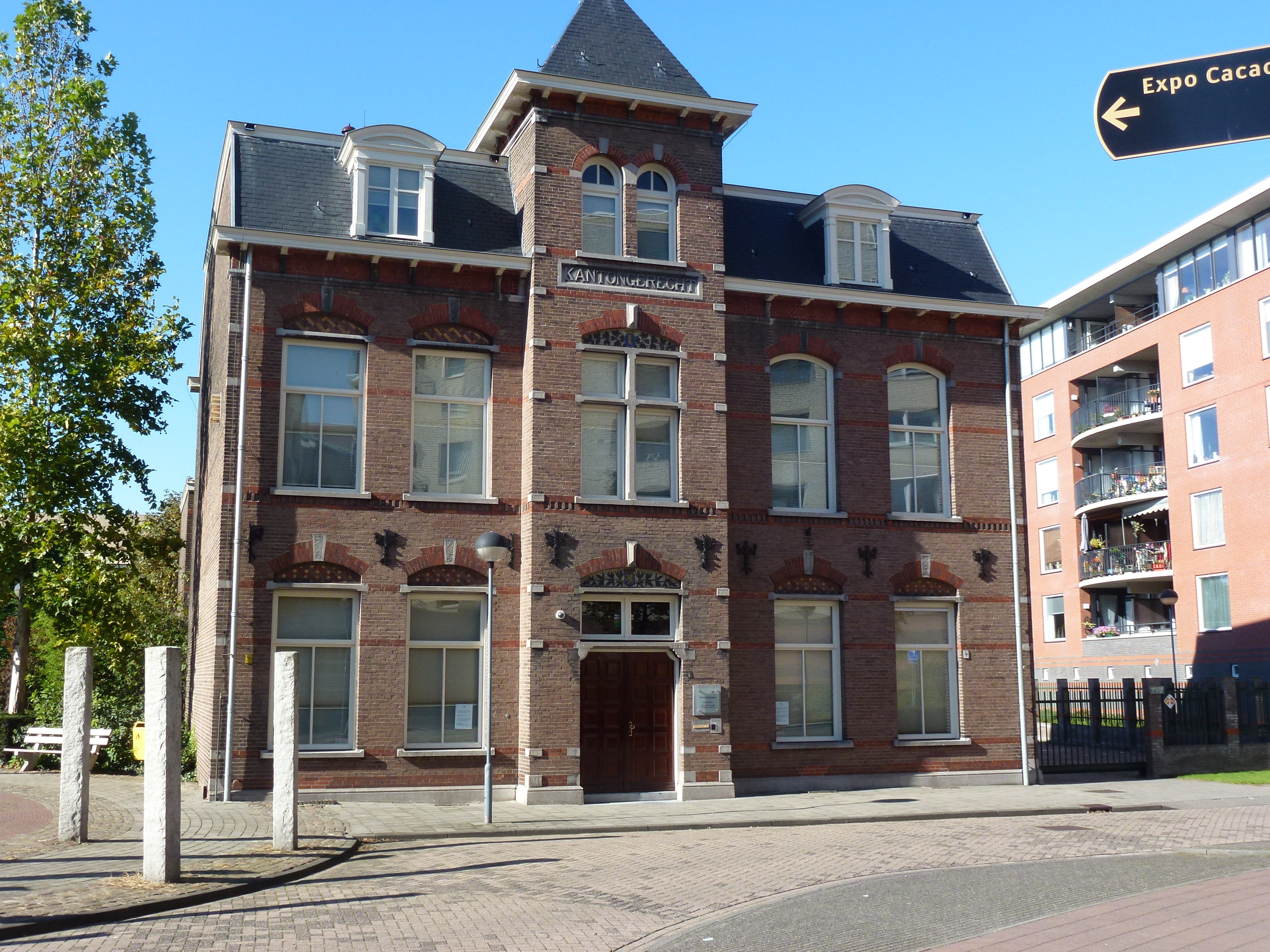 Voormalig Kantongerecht Helmond